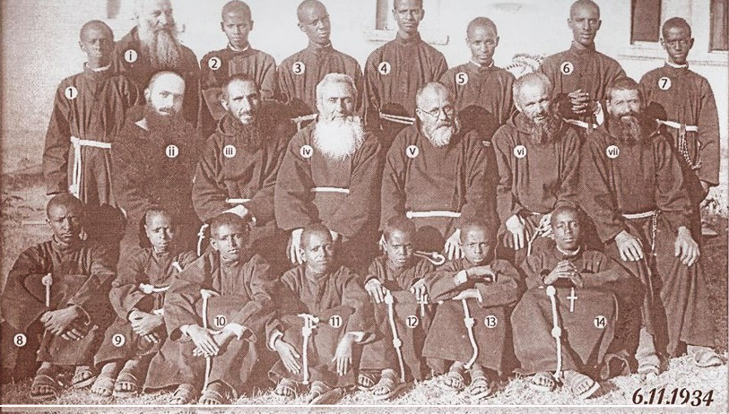 I primi fratini cappuccini eritrei con i loro superiori a Segheneiti (Eritrea) (Paolo da Adengofom) (Cesare da Asmara) ዘርኣይ ደረስ - Zerai Deres (Francesco da Adiyeheys) (Sebastiano da Afelba) (Giovanni da Arbate'smera) (Antonio da Shiketi) (Pietro da Adikefelet) (Agatangelo da Inadeqo) (Andrea da Halay) (Cassiano da Bareknaha) (Bonaventura da Hebo) Tekesteberhan Ghebremedhin (Domenico da Ma'arda) (Giacomo da Keren) (Guido da Gheshinashim) i. F. Leonardo da Soresina ii. P. Prospero da Milano iii. P. Egidio da Triora iv. P. Giacinto da Santa Cristina v. P. Egidio da Verano vi. P. Ugolino da Lissone vii. P. Benedetto da Romano